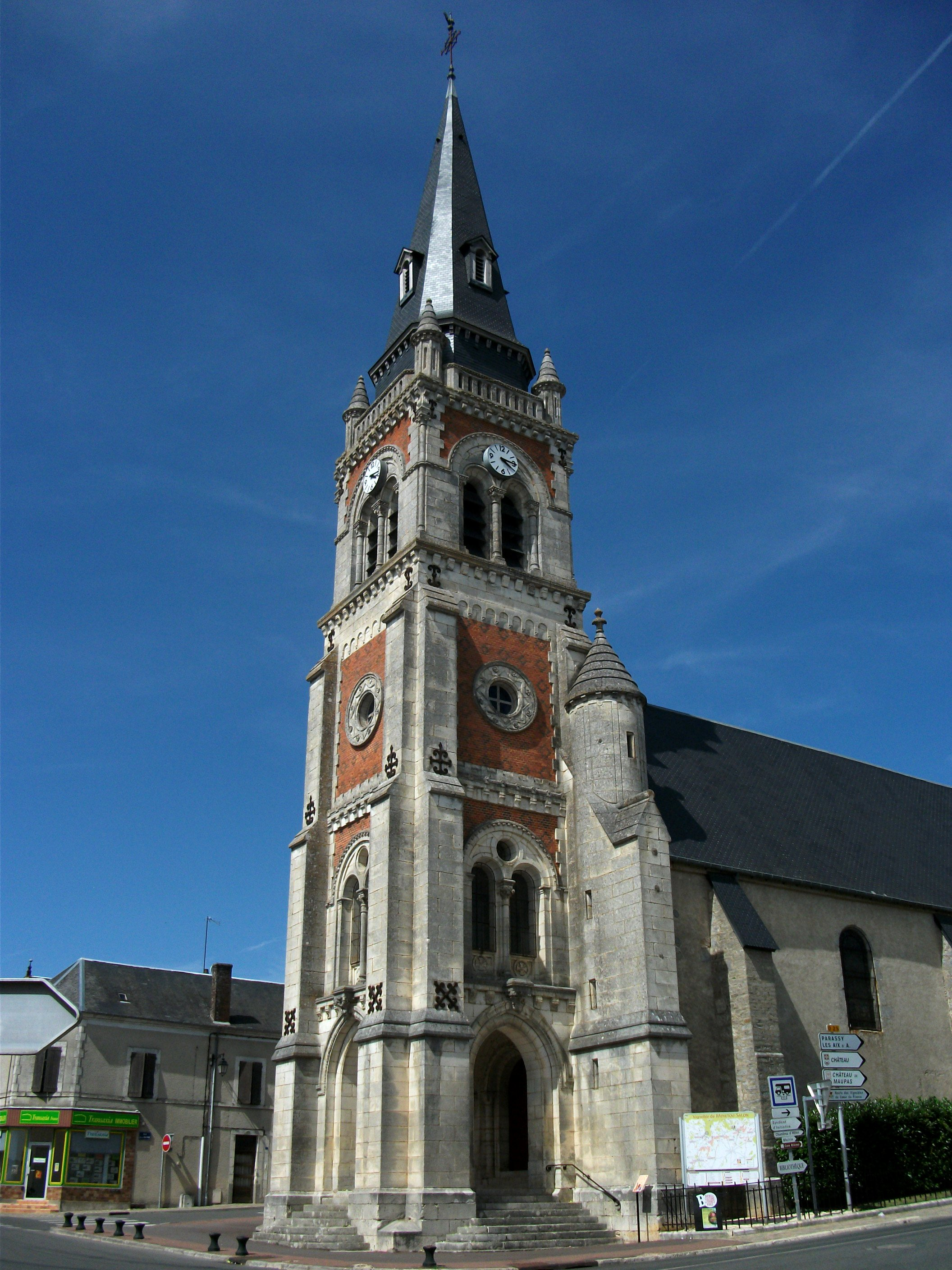 Église de Menetou-Salon, Cher, Centre, France